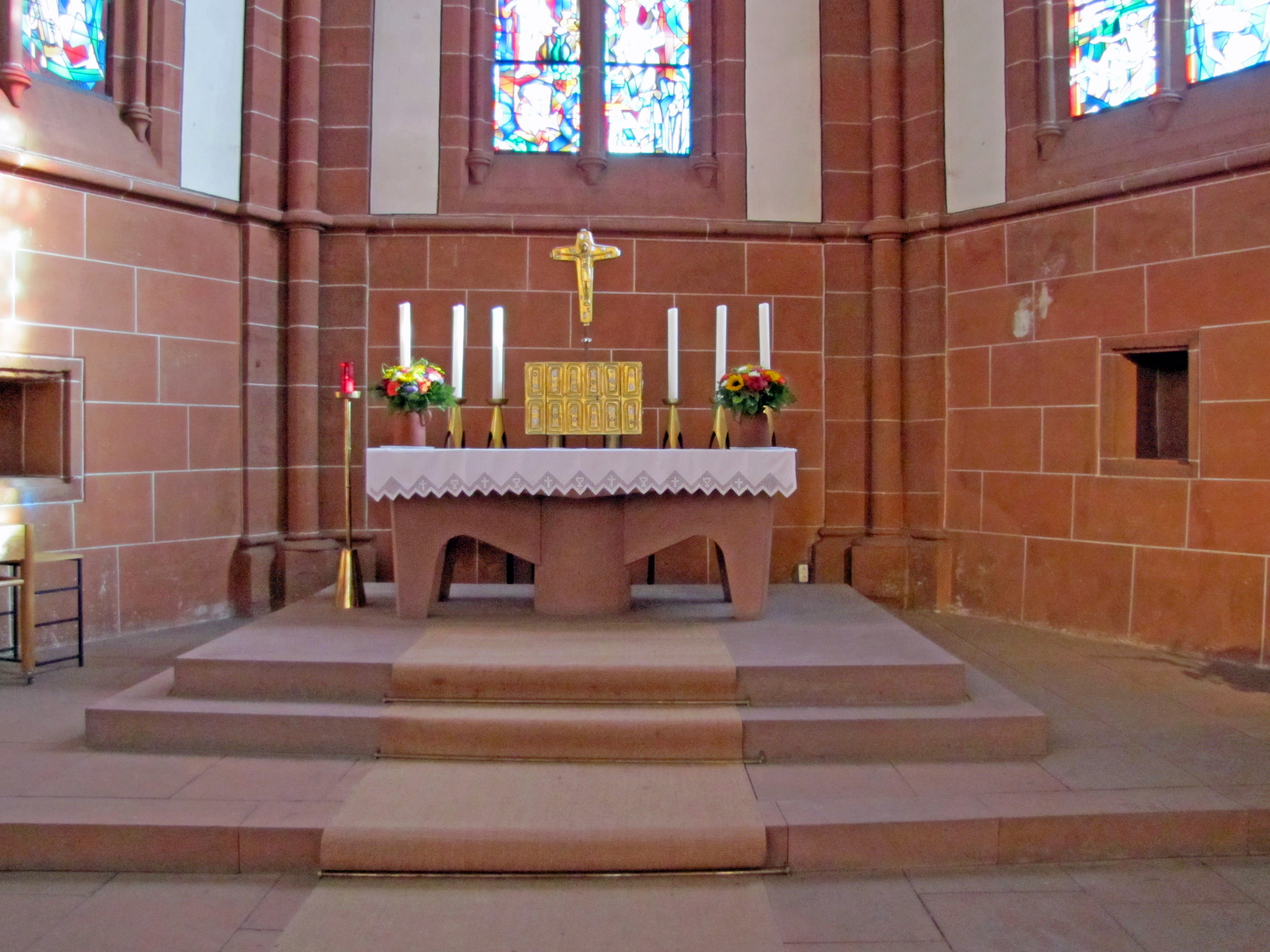 Der katholische Altar im Wetzlarer Dom.